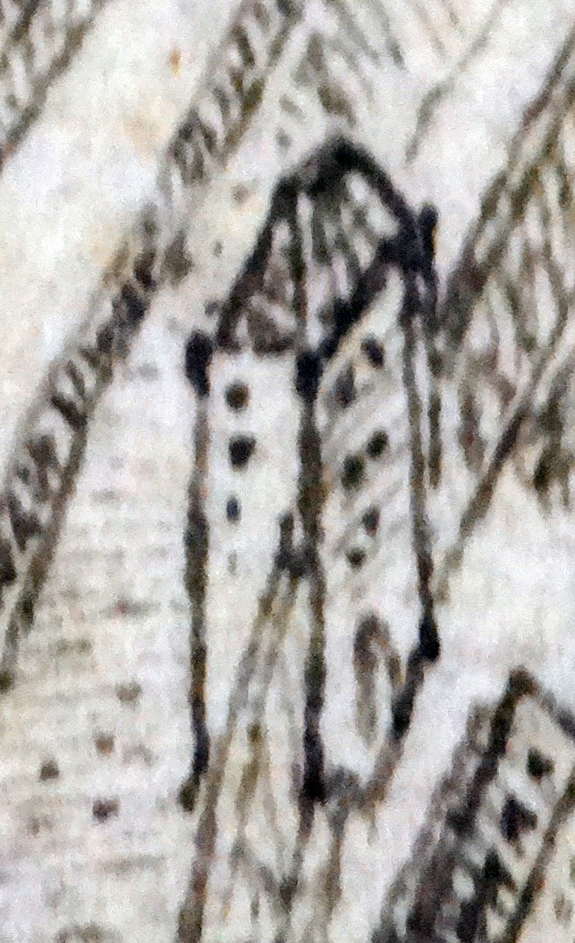 Susannenturm, Worms. Detail aus: Peter Hamman: Statt Wormbß wie selbige 1631 vor dem Schwedischen Ruin der Vorstätt [...] verblieben. Stadtarchiv Worms, Abt. 1B, Nr. 48.